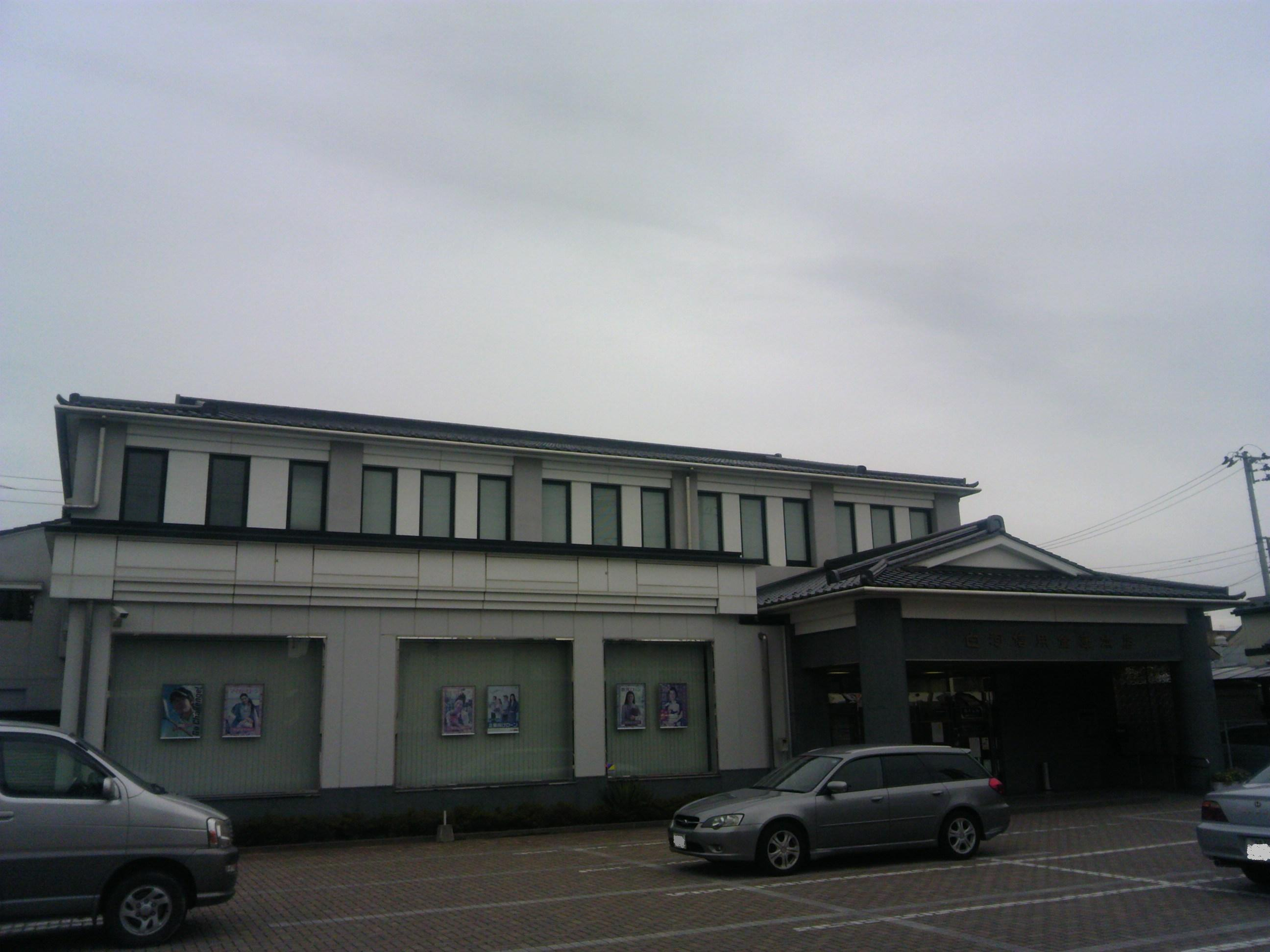 白河信用金庫本店